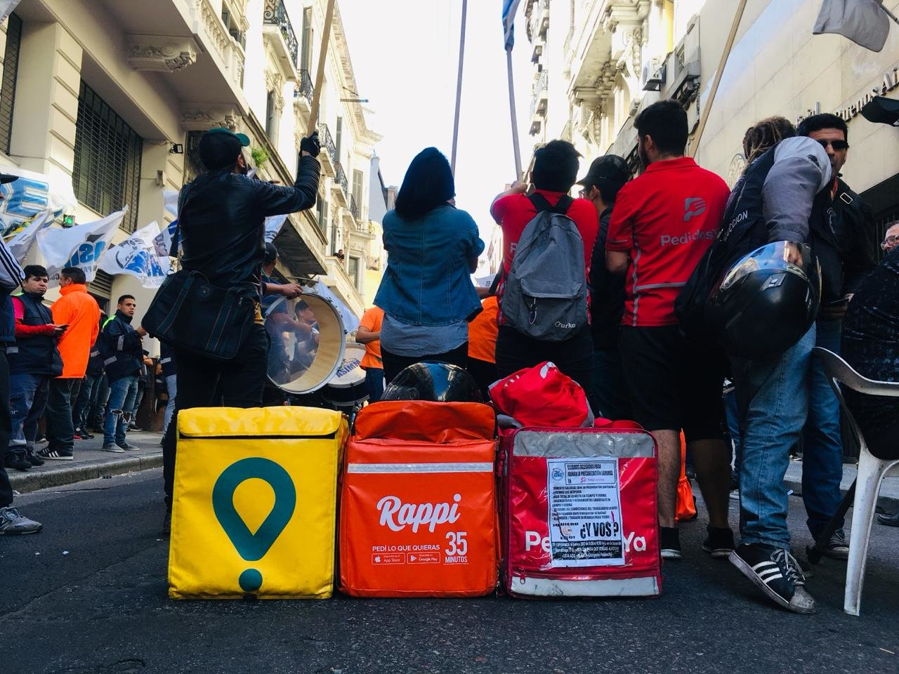 Los trabajadores de Rappi, Glovo y PedidosYa se manifestaron, junto al sindicato ASIMM, en las puertas de la fiscalía –donde se desarrollaba una audiencia de mediación- en apoyo al fallo del juez Roberto Gallardo que suspende la actividad de las empresas hasta tanto regularicen las condiciones básicas de seguridad según las normas vigentes.